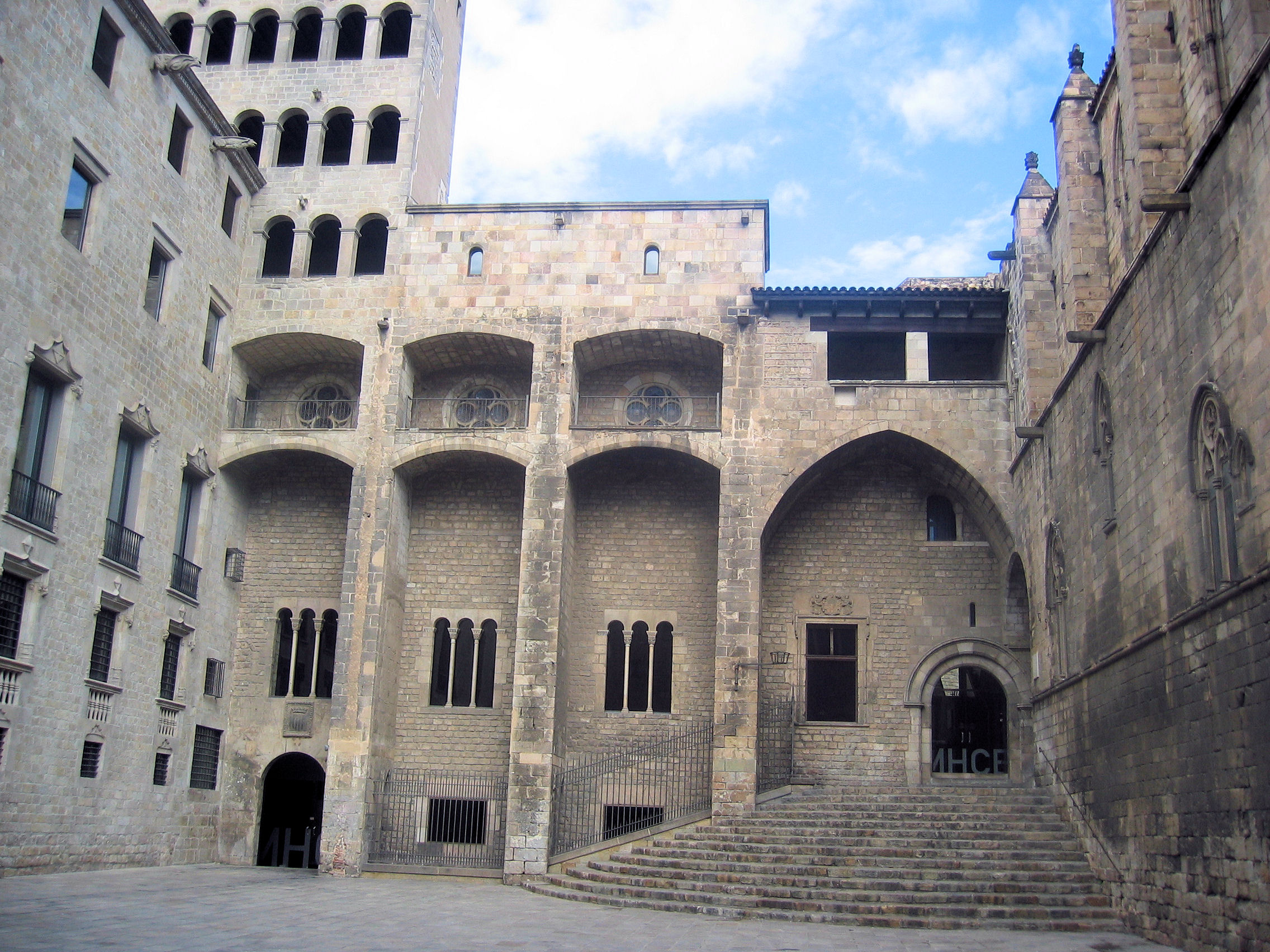 Plaça del Rei, Barri Gòtic, Barcelona